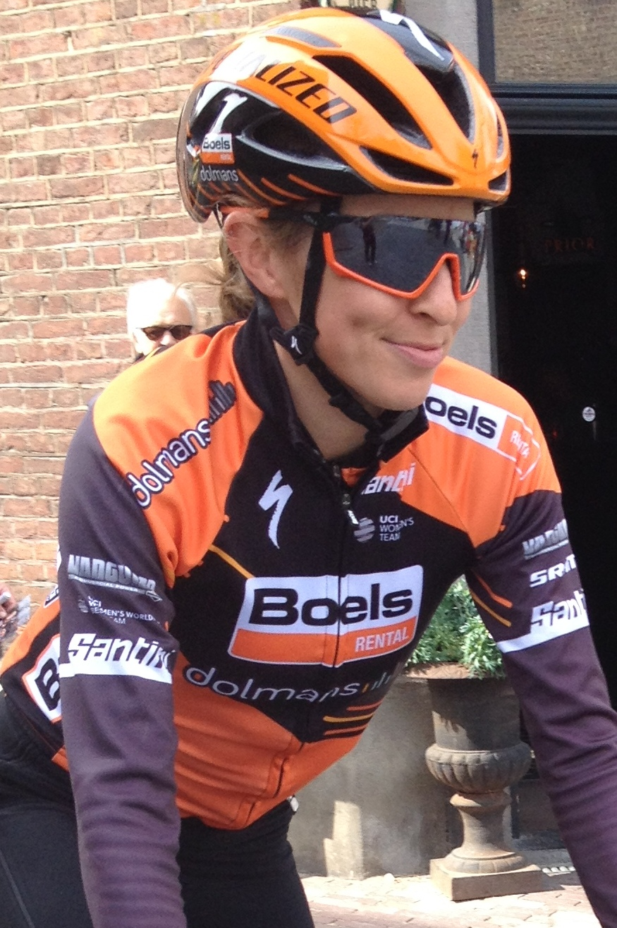 Volta Limburg Classic 2019 voor vrouwen met start en finish in Eijsden, Limburg, Nederland